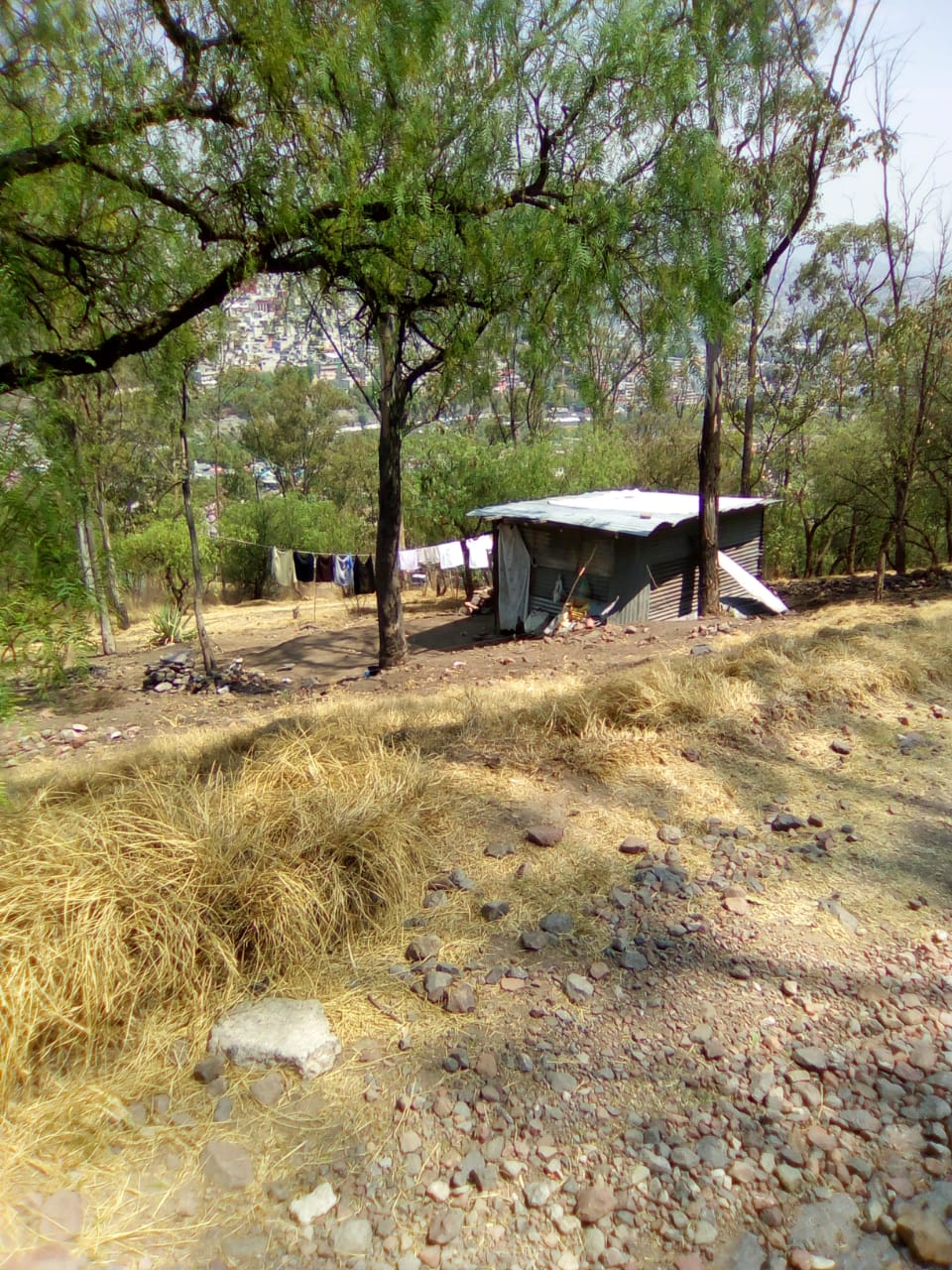 En esta foto se observa la invasión y el daño ecológico que están generando los invasores al cerro de Guerrero